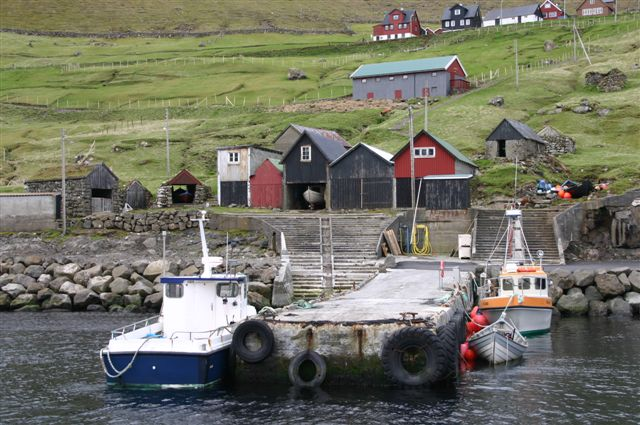 Sydradalur, Kalsoy